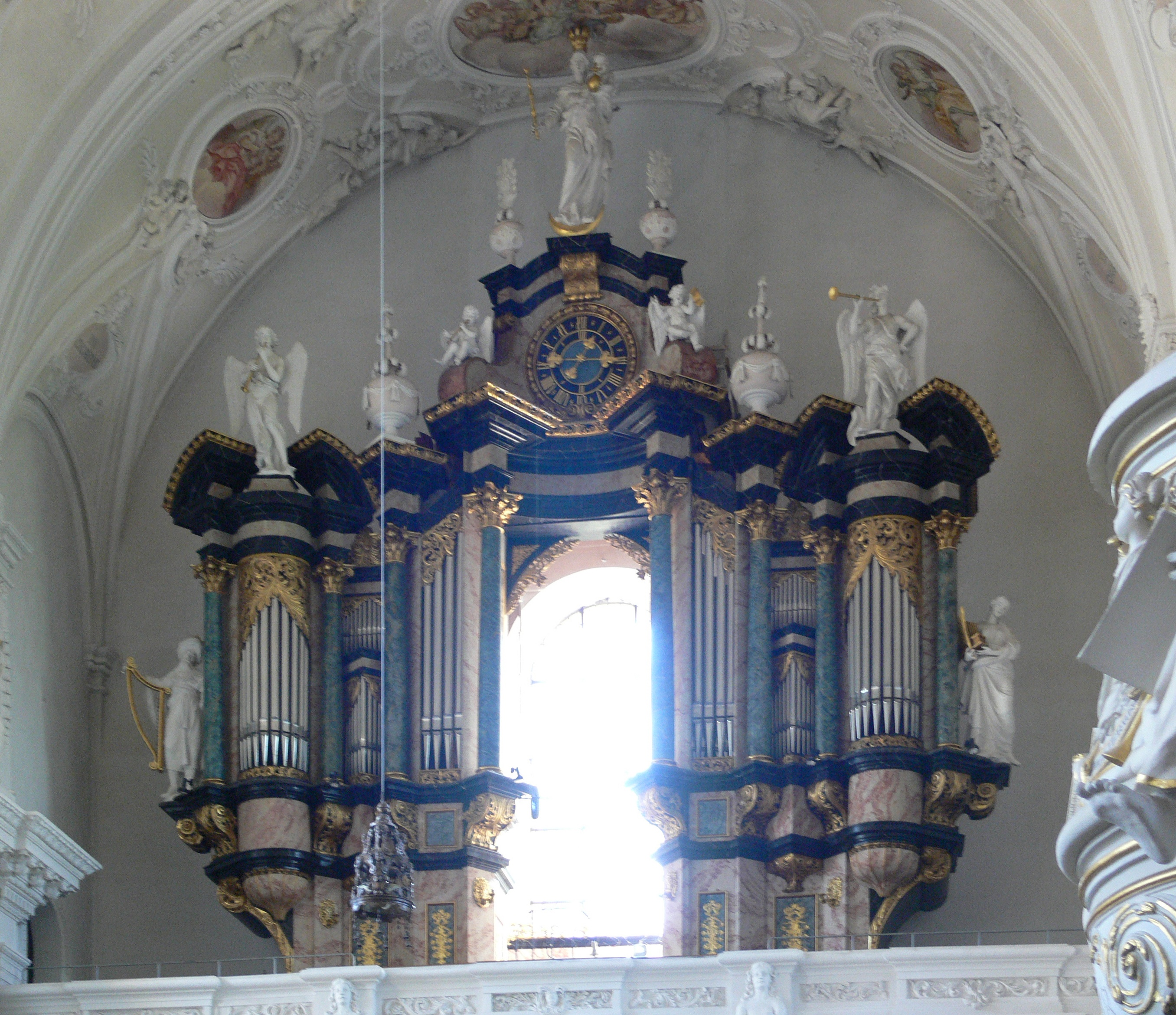 Schönenbergkirche, Ellwangen (Jagst) Orgel von P. P. Köberle (1974/1975) im Gehäuse von 1711 von Allgaier (Figuren von M. Paulus)